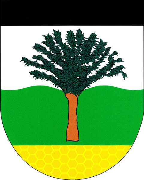 Znak obce Obora v okrese Blansko